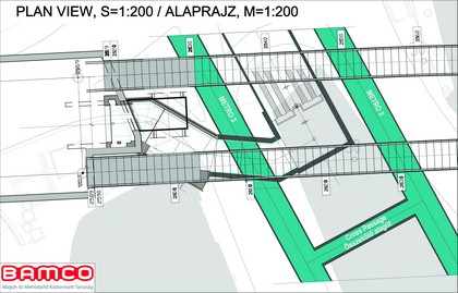 A 4-es metró fúrásakor a két pajzsköpeny 1,5 méterre haladt el az üzemelő 3-as metró alagútjai felett.